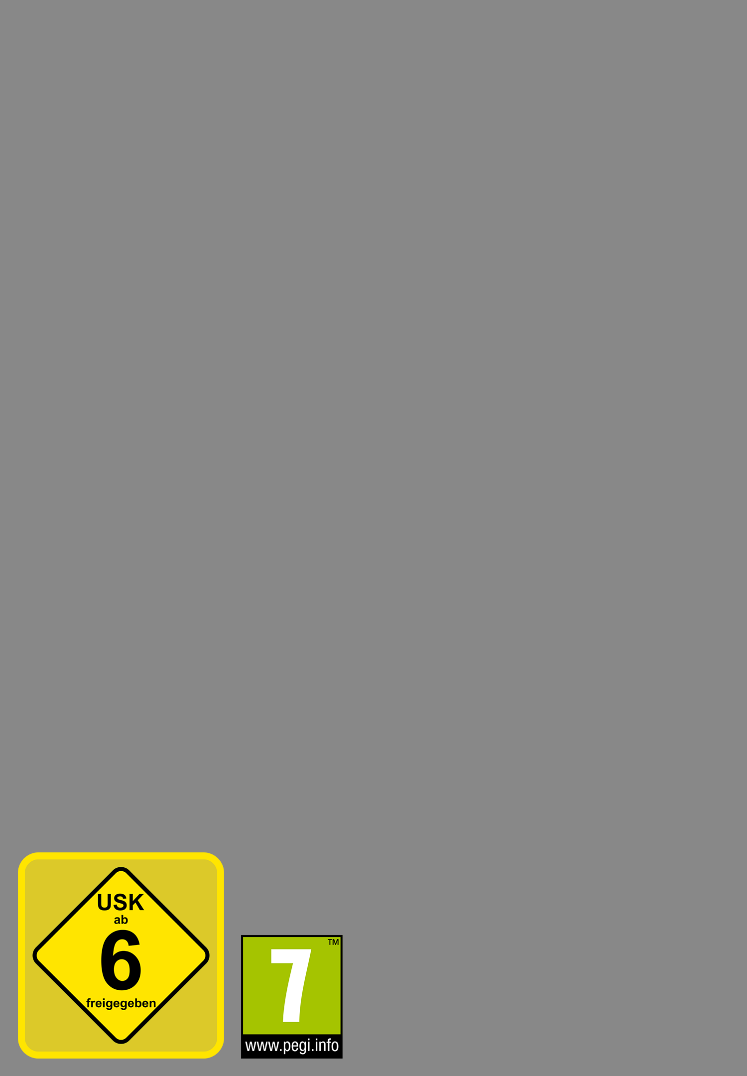 USK- und PEGI-Altersfreigaben im Verhältnis zu den Abmessungen der Vorderseite einer DVD-Hülle. Wie sie z. B. auf dem Cover eines Wii-Spiels gedruckt würden